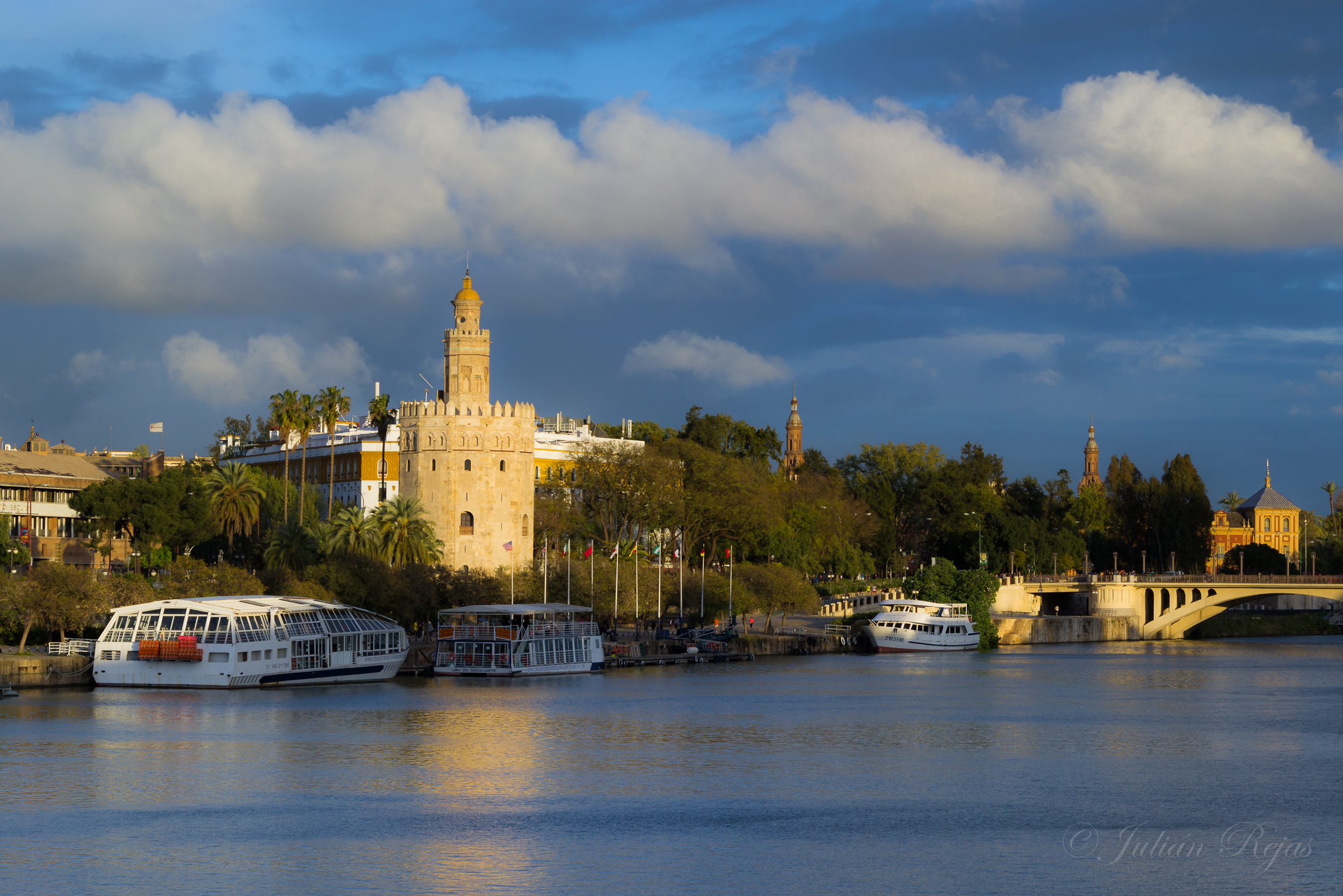 Torre del Oro, Sevilla.